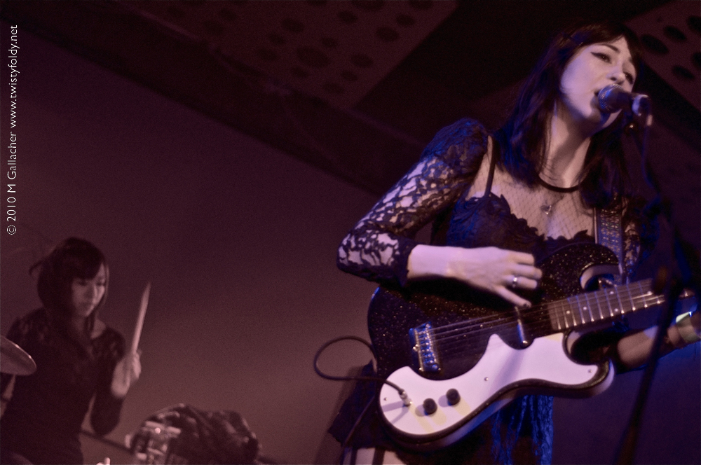 Dum Dum Girls performing in Glasgow in 2010.